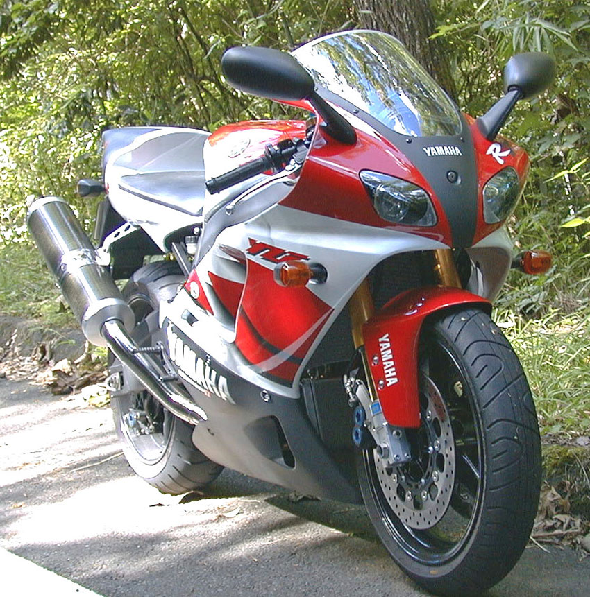 YAMAHA YZF-R7 ノーマル状態